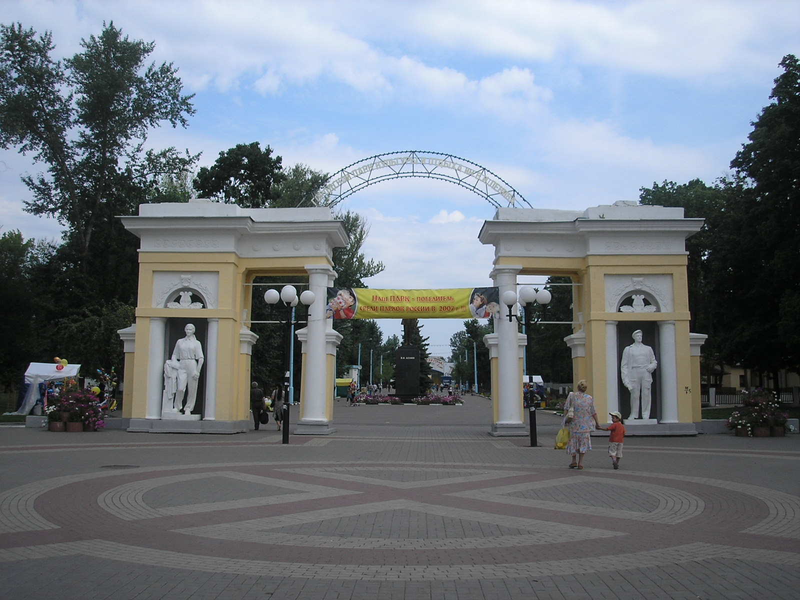 Центральный парк культуры и отдыха (бывший парк им. В.И. Ленина)